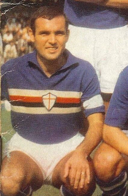 Il calciatore italiano Mario Frustalupi capitano della Sampdoria nella stagione 1966-67.